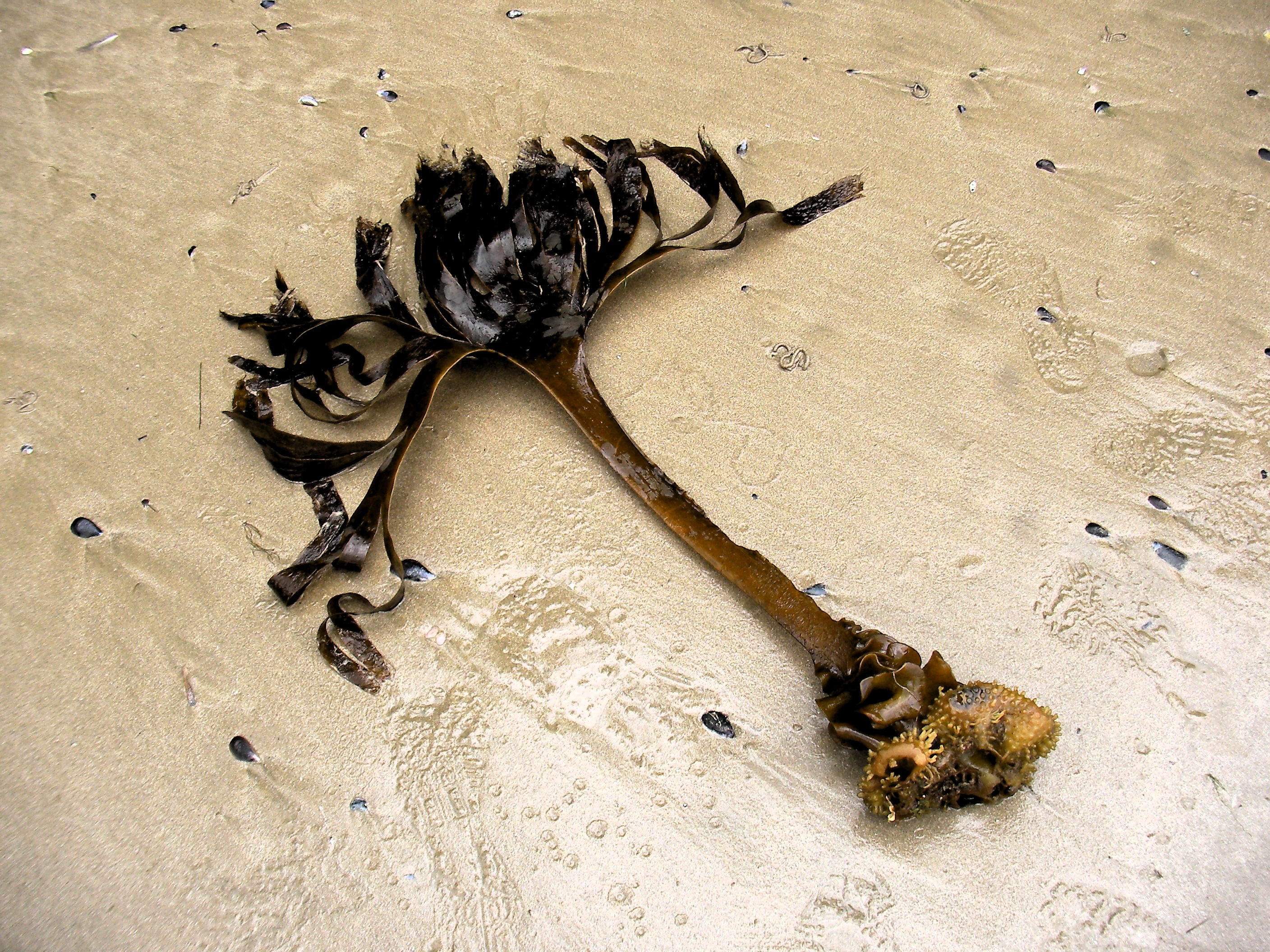 Alga chamada Golfo (Saccorhiza polyschiles) nunha praia galega.